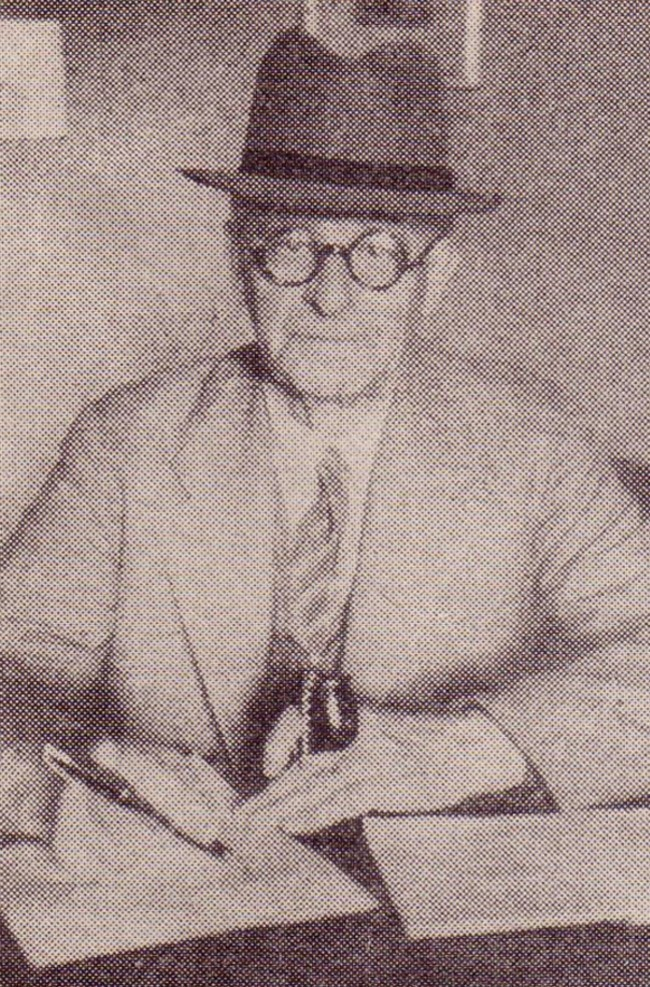 J.J. Groeneweg (1870-1945)